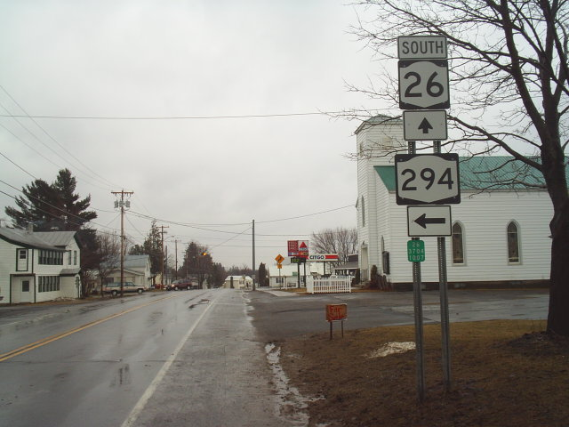 NY 26 at NY 294 in West Leyden